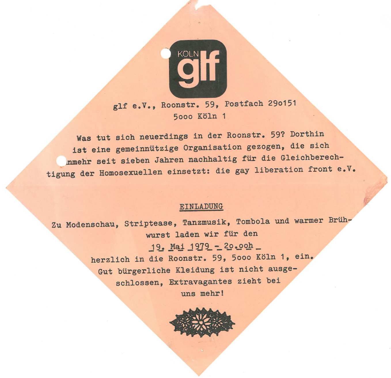 Gay Liberation Front (GLF) Köln, Flyer